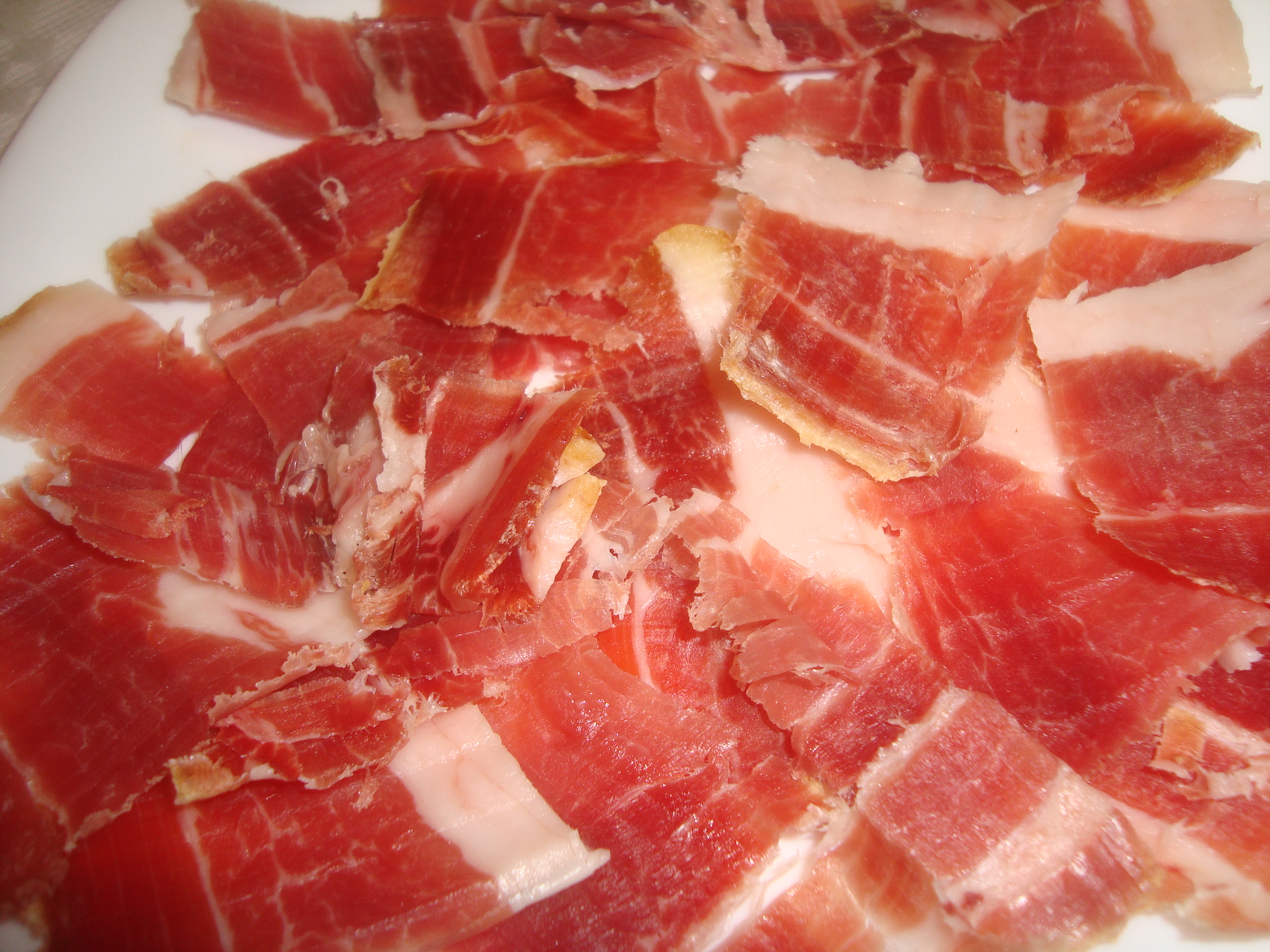 Plato de paletilla serrana; tapa de serrano, paletilla curada (España).